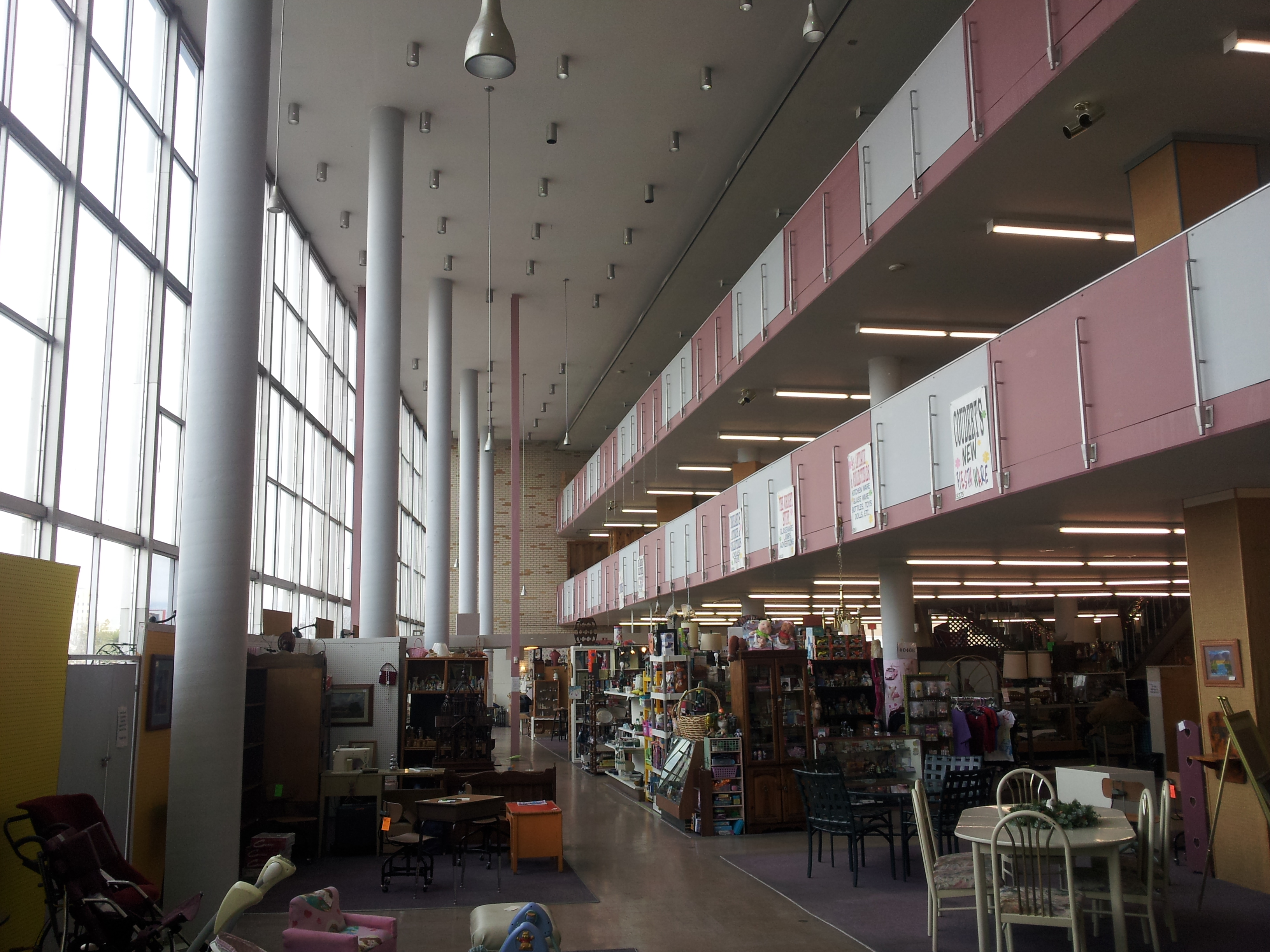 Highland Business, Albuquerque, NM 87108, USA